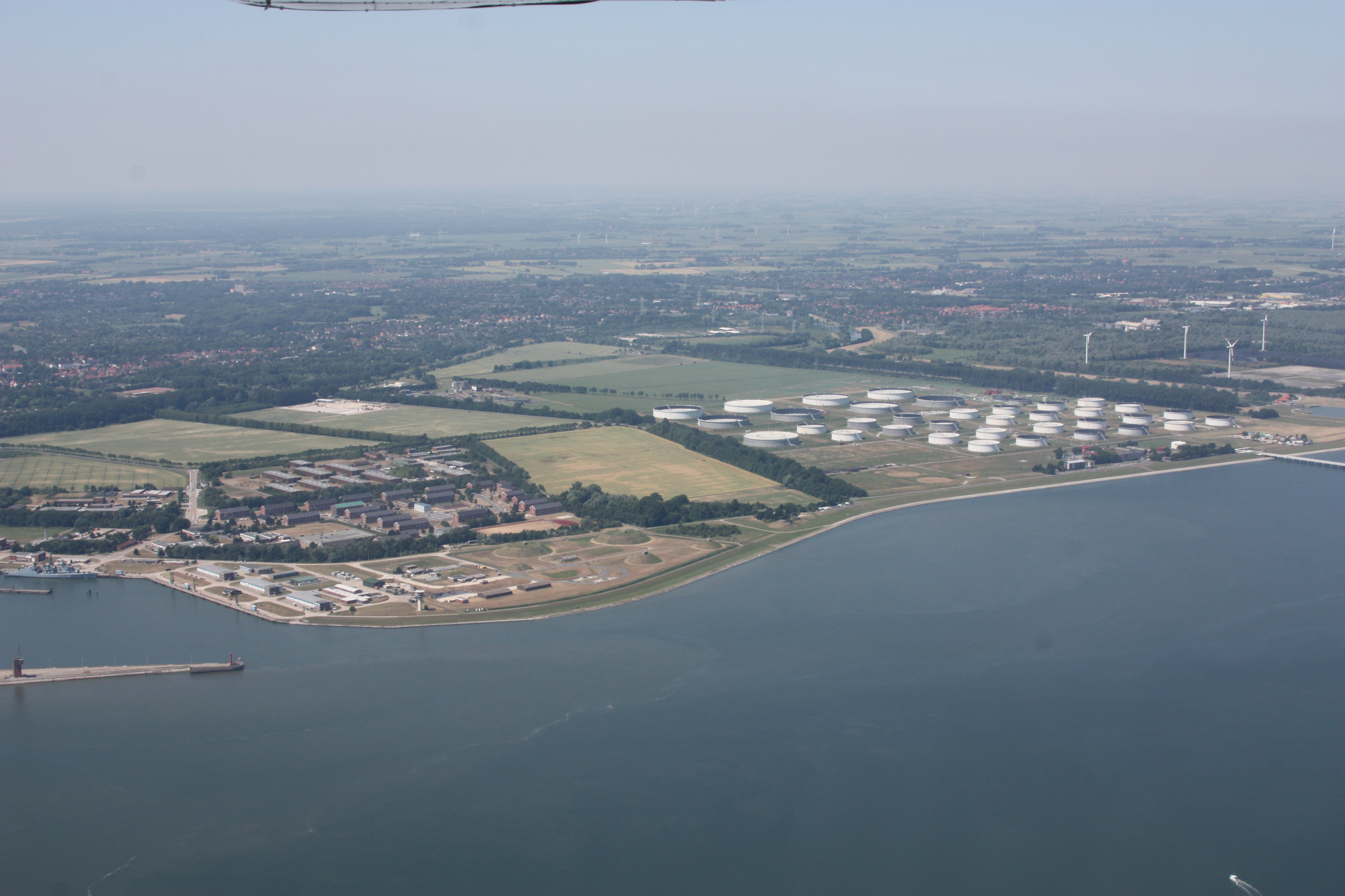 Flug über den Jadebusen und Wilhelmshaven, von Nord nach Süd; weiter nachOldenburg; Flughöhe 500 m = 1500 ft; Juli 2010